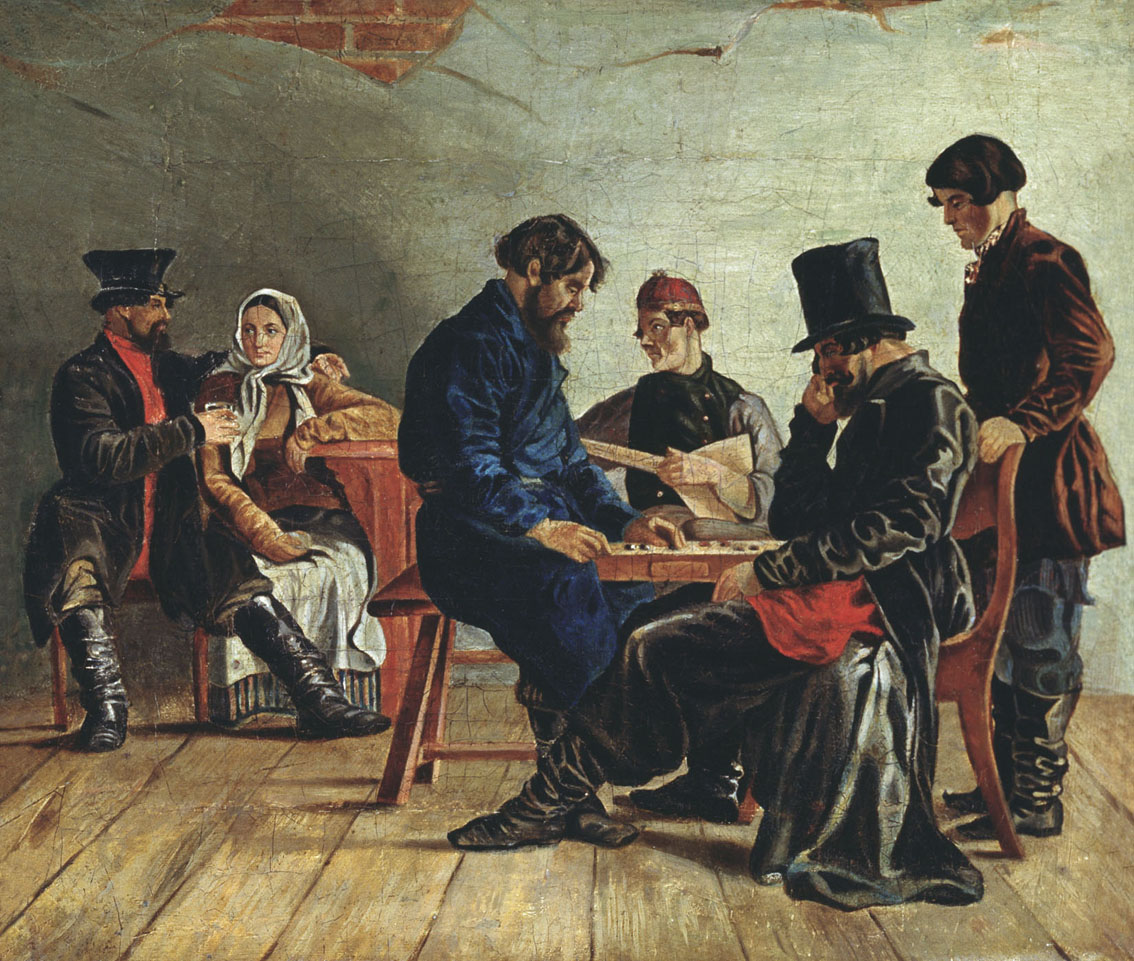 Игра в шашки. Холст, масло, 24 × 29 см. Нижегородский государственный художественный музей, Нижний Новгород